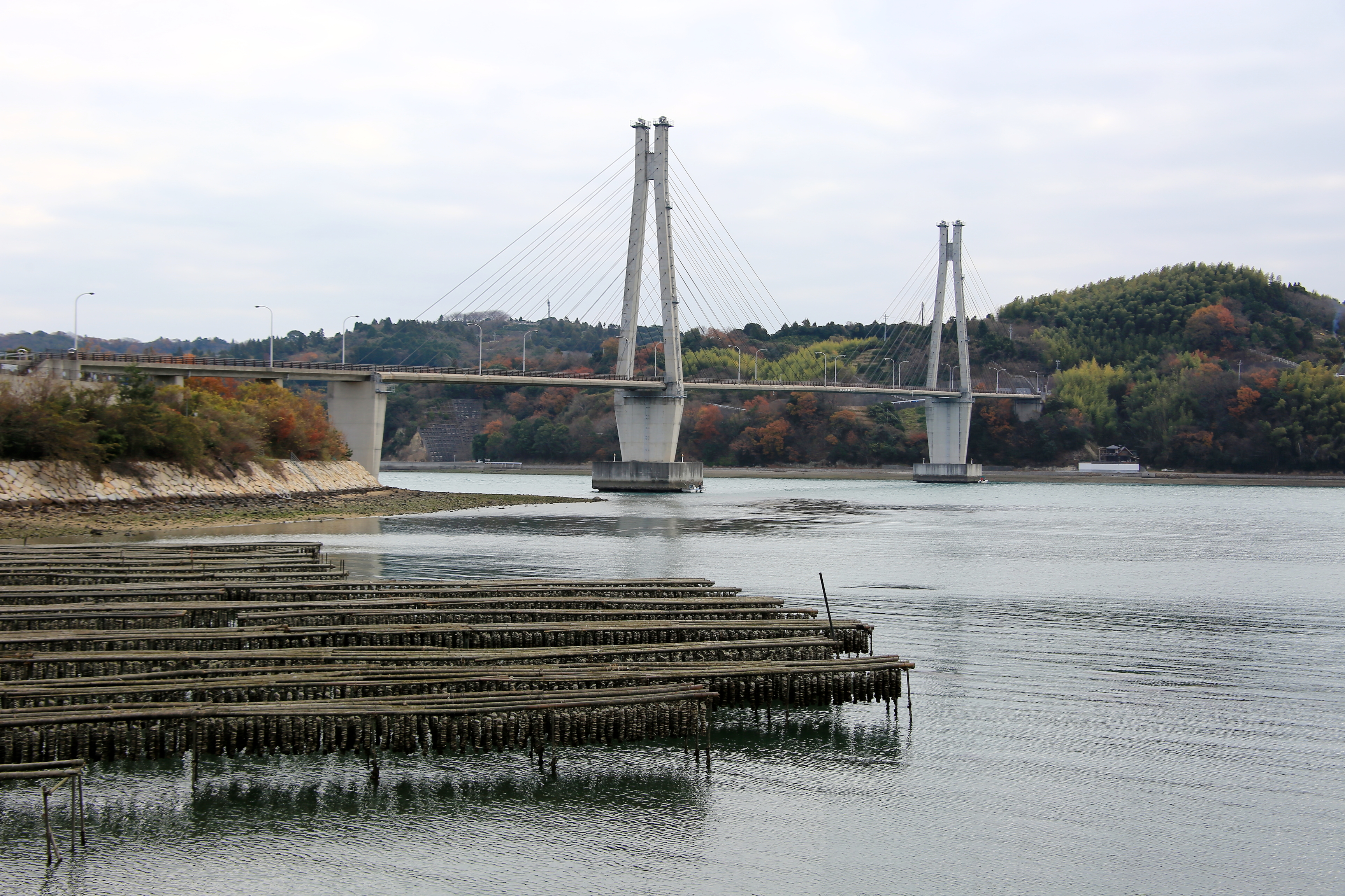 広島県の大芝大橋